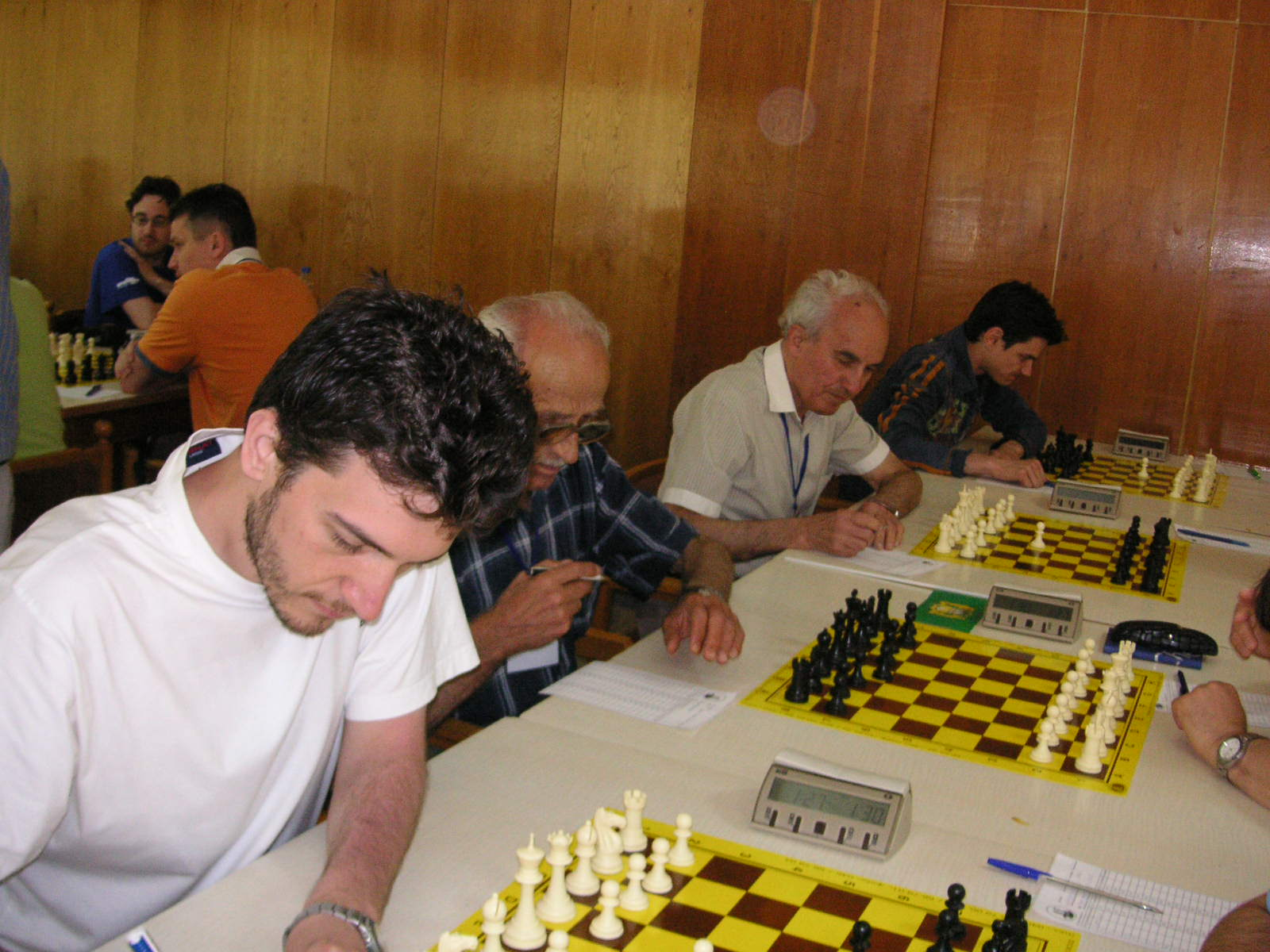 Българският състав на Европейската клубна купа по шах, 2007г.